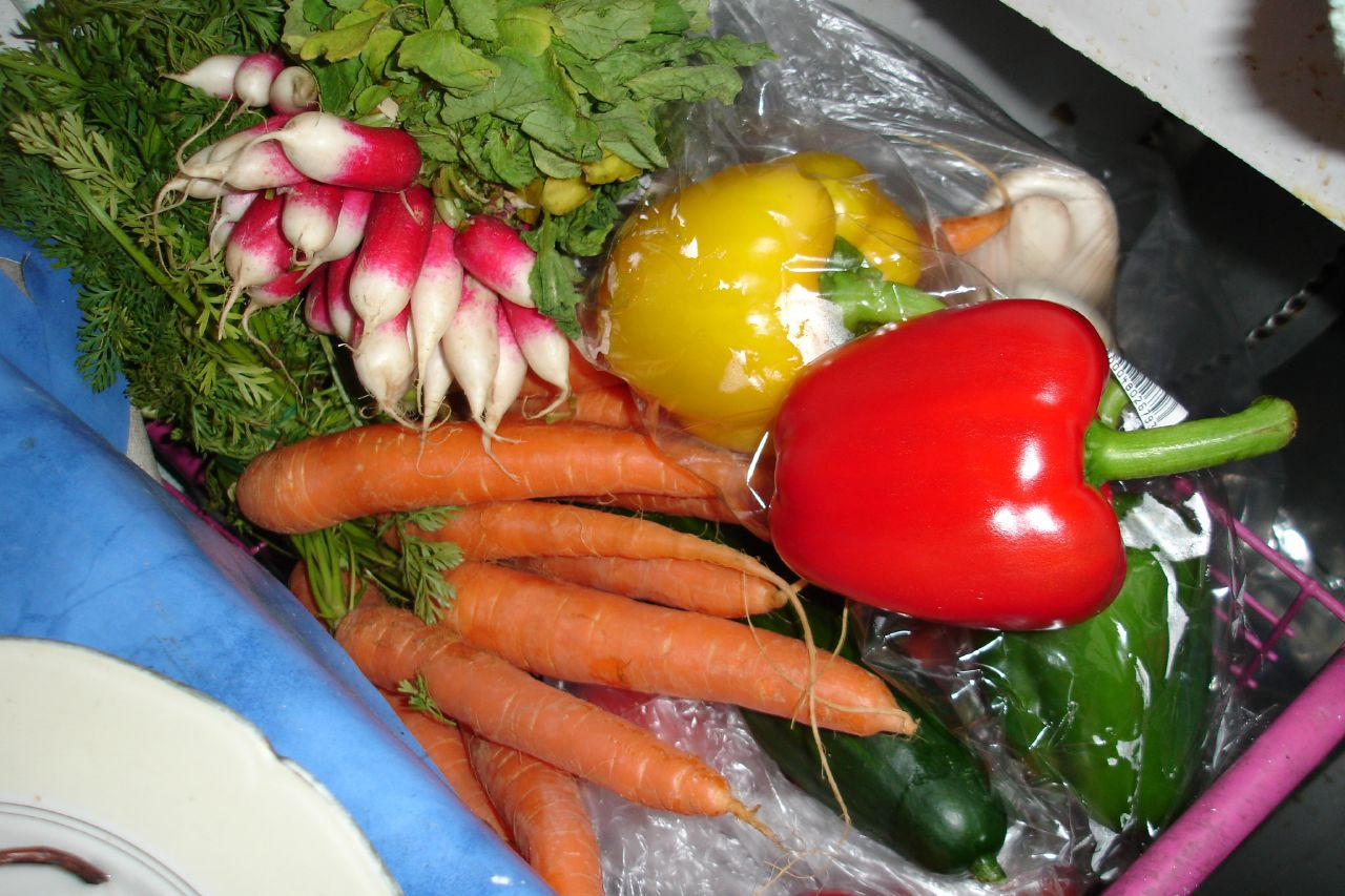 Sebze örnekleri.